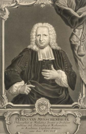 Petrus van Musschenbroek (1692-1761), dutch physicist